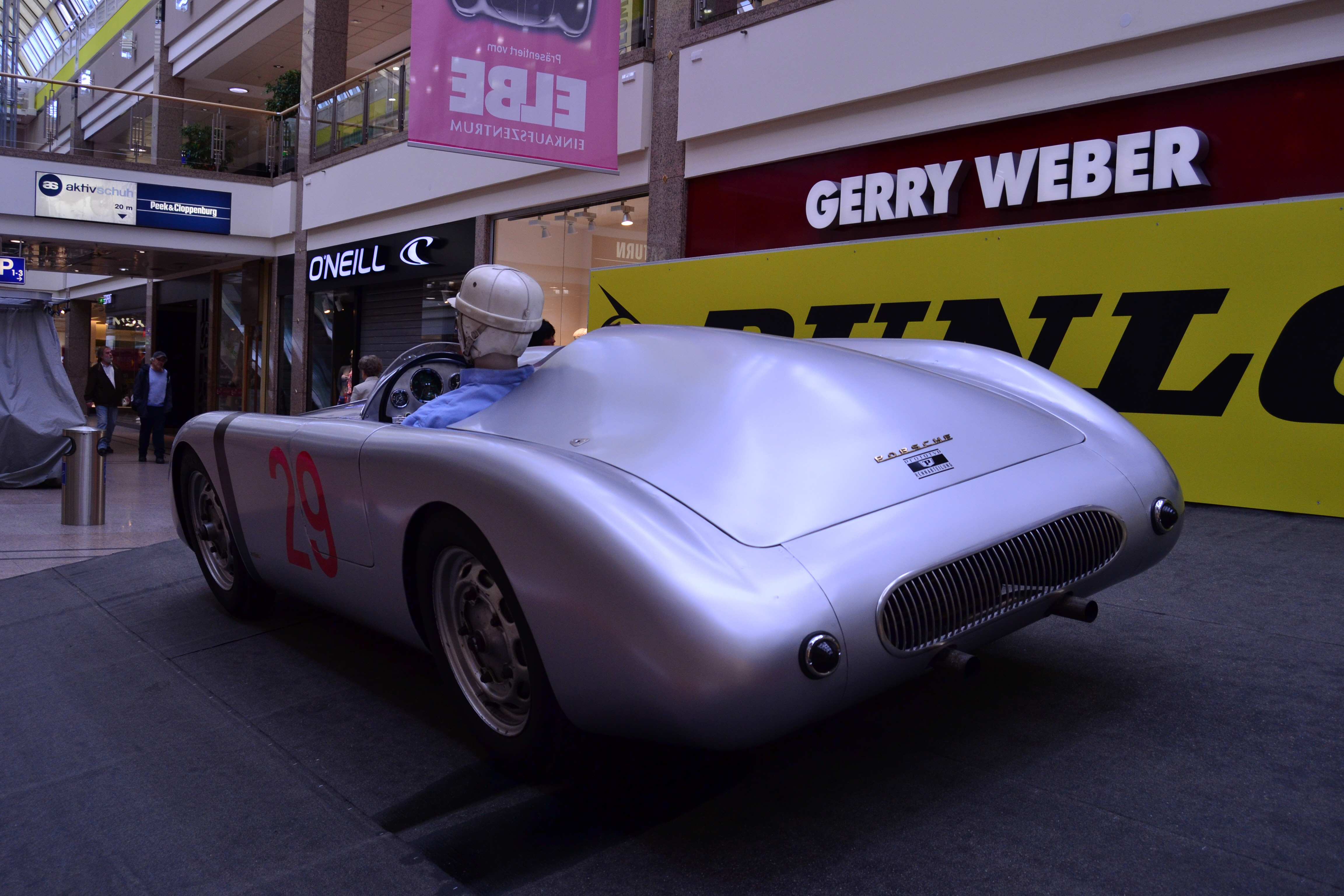 Original 1954 Rometsch Porsche Spyder Prototyp , 1086 ccm, 68 PS, 200 km/h, 550 kg auf Basis eines frühen Porsche 550 Spyder. Erst 2009 wurde er in einer Lagerhalle in Hockenheim wiederentdeckt